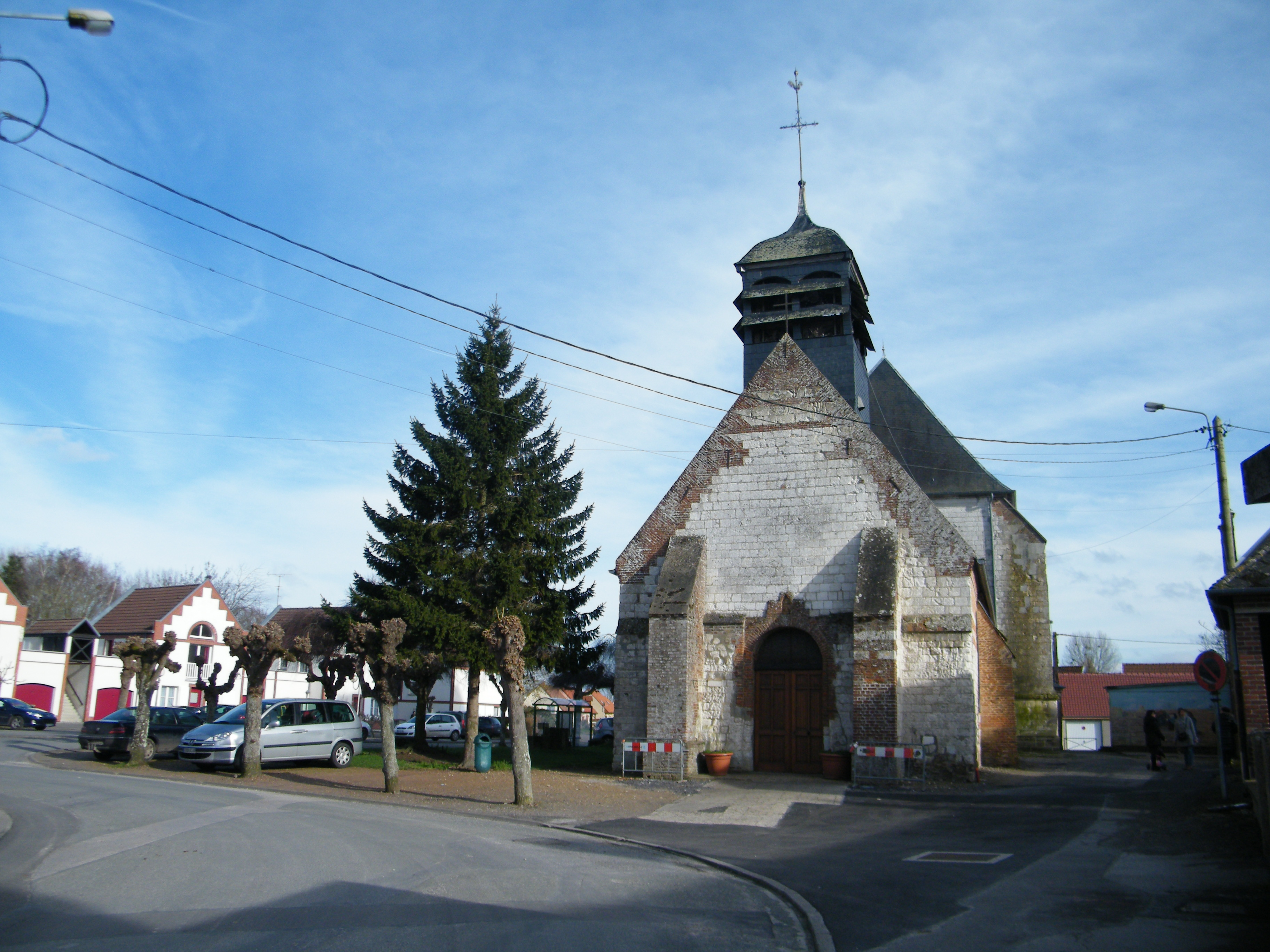 L'église Saint-Martin de Cambron, Somme, France.